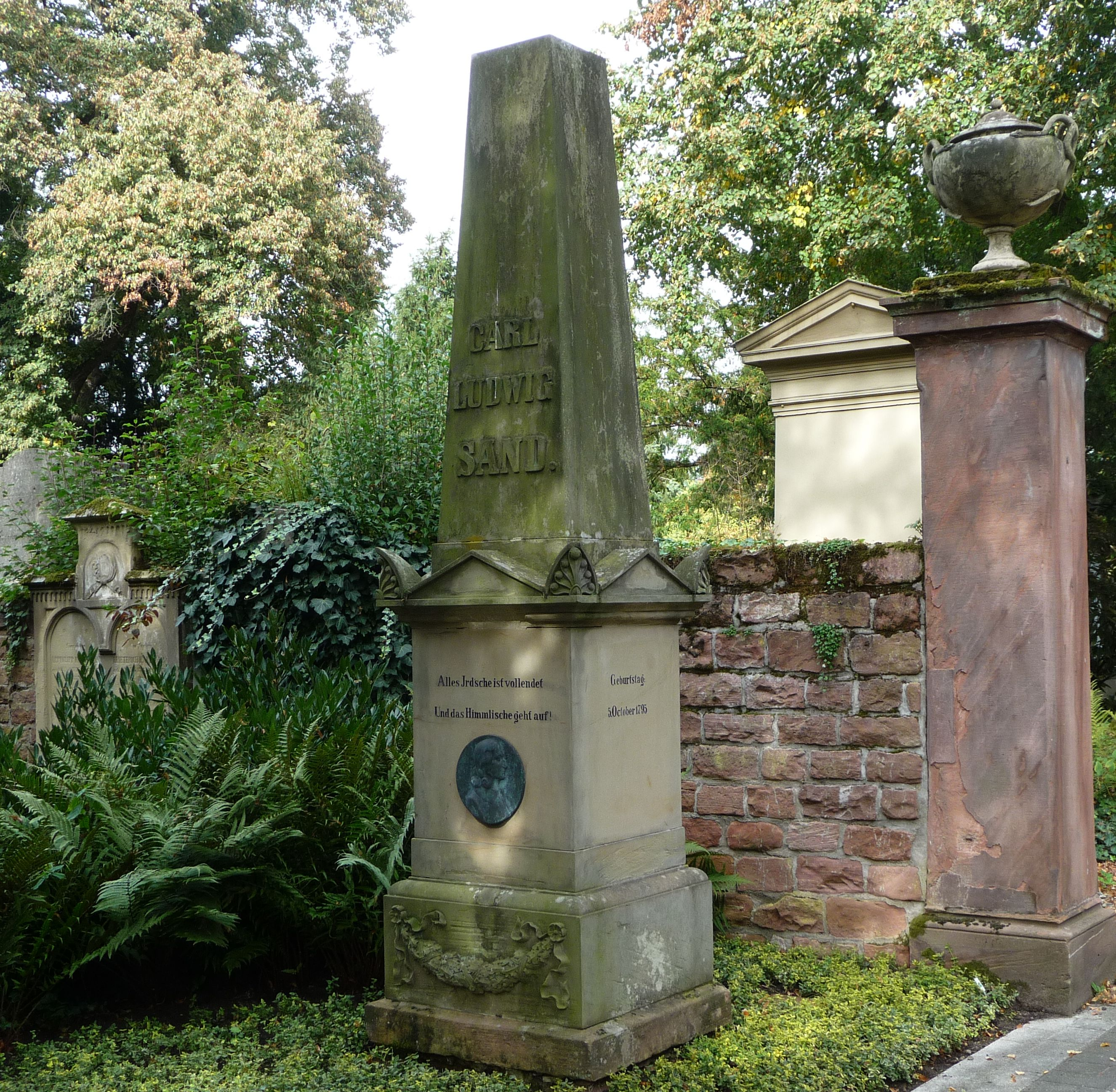 Carl Sand, der Mörder Kotzebues